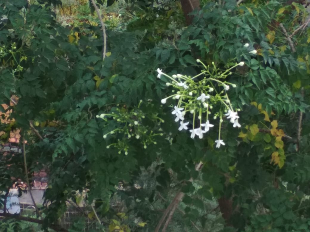 आकाशनीम किंवा बुचाचे झाड